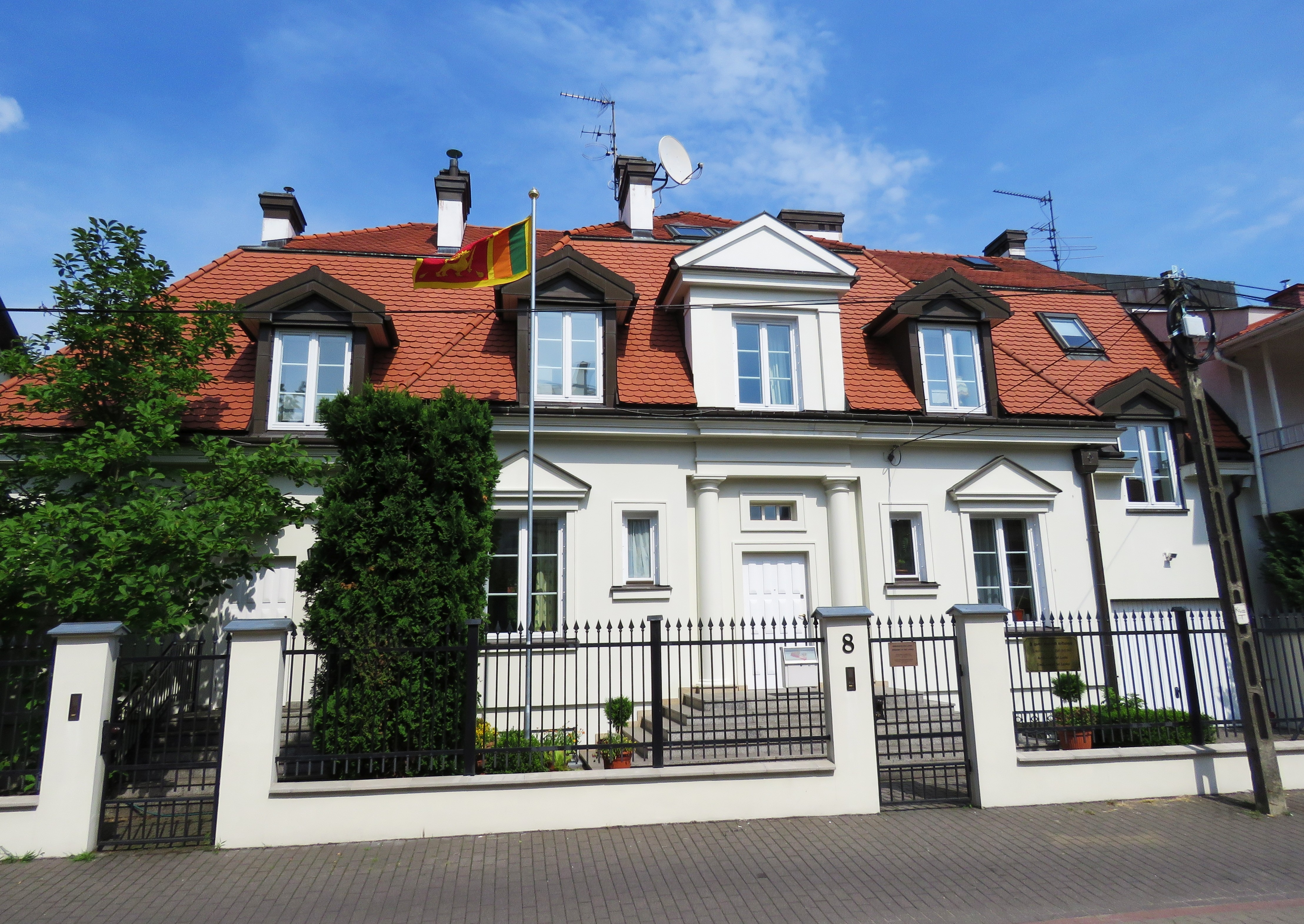 Ambasada Sri Lanki w Polsce